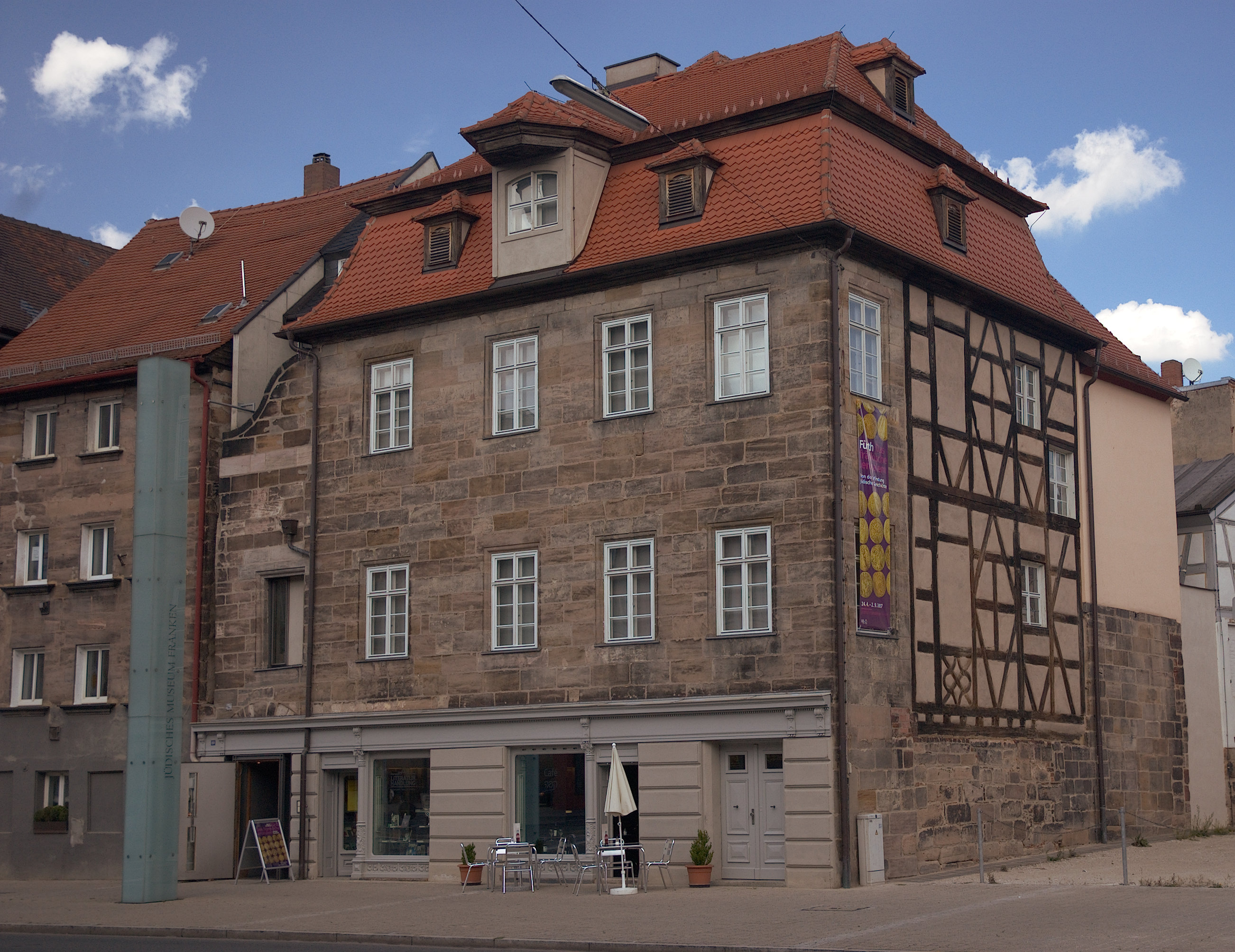 Das Jüdische Museum Franken in Fürth